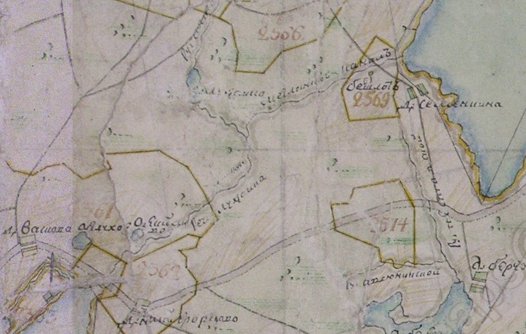 река Канава на плане генерального межевания 1778 года